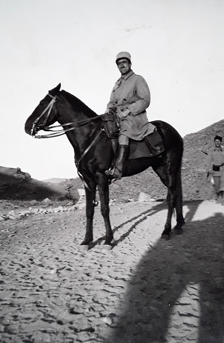 Albert Chemin monté à cheval pendant la Campagne du Maroc, 26 juillet 1932, Tafilalet.